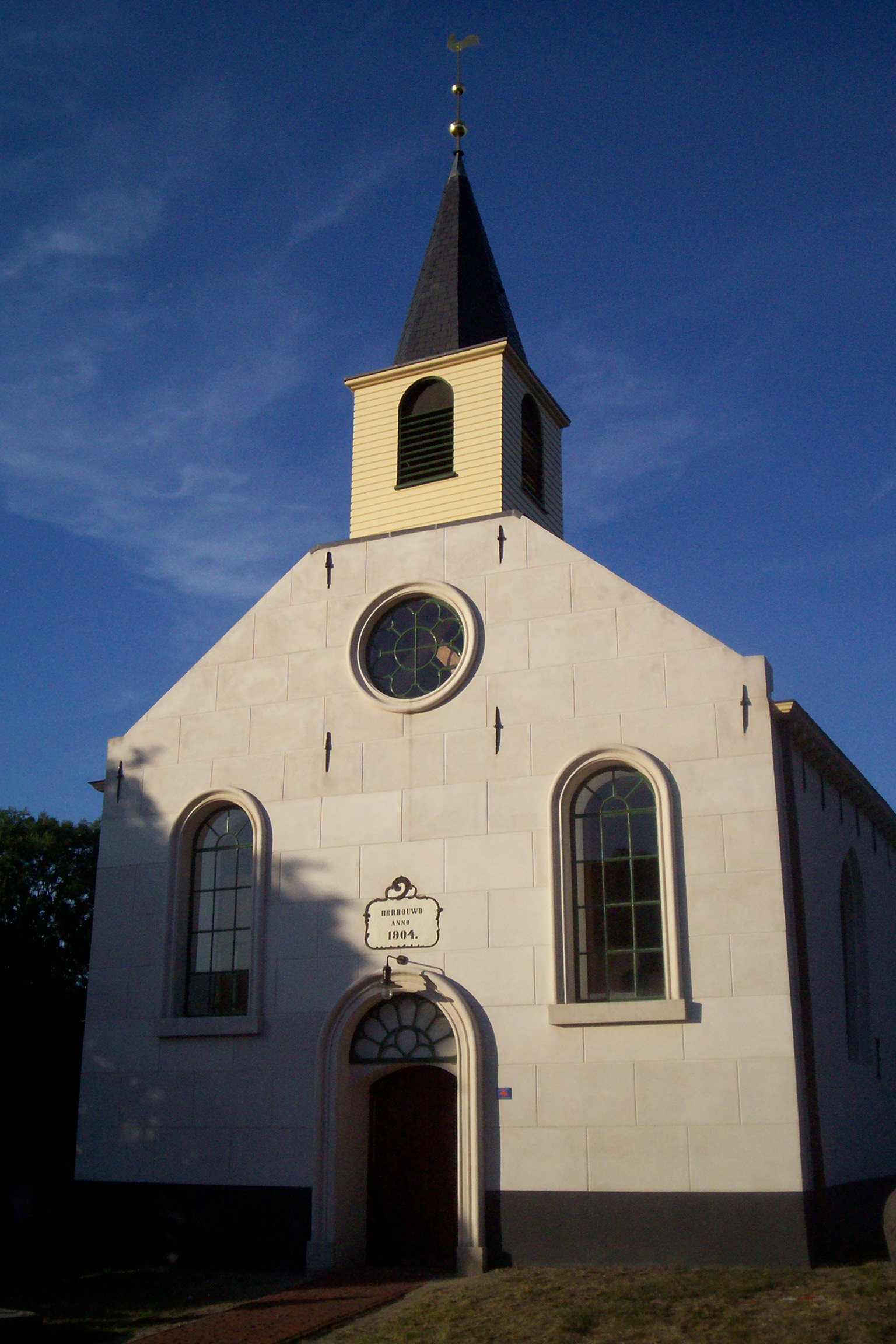 De kerk van Engelbert, gem. Groningen